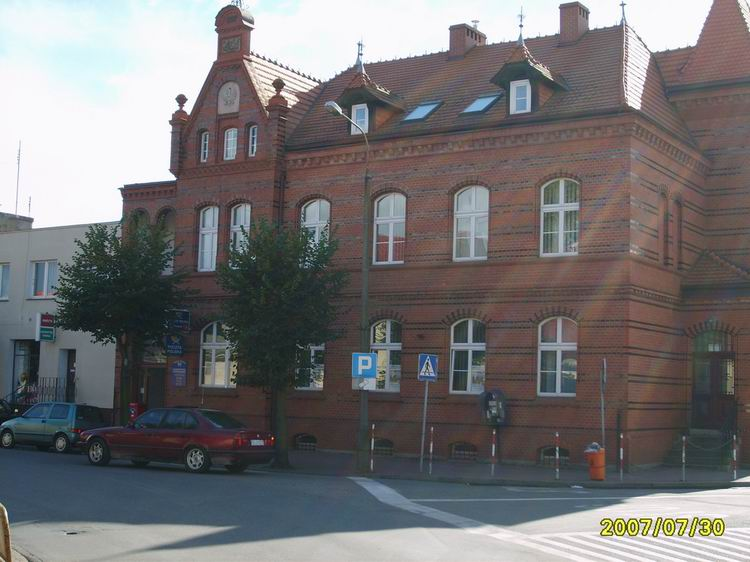 Budynek Poczty Polskiej.